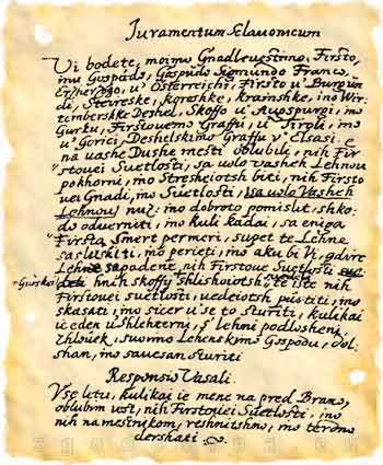 Dokument Iuramentum sclavonicum iz 17. stoletja.